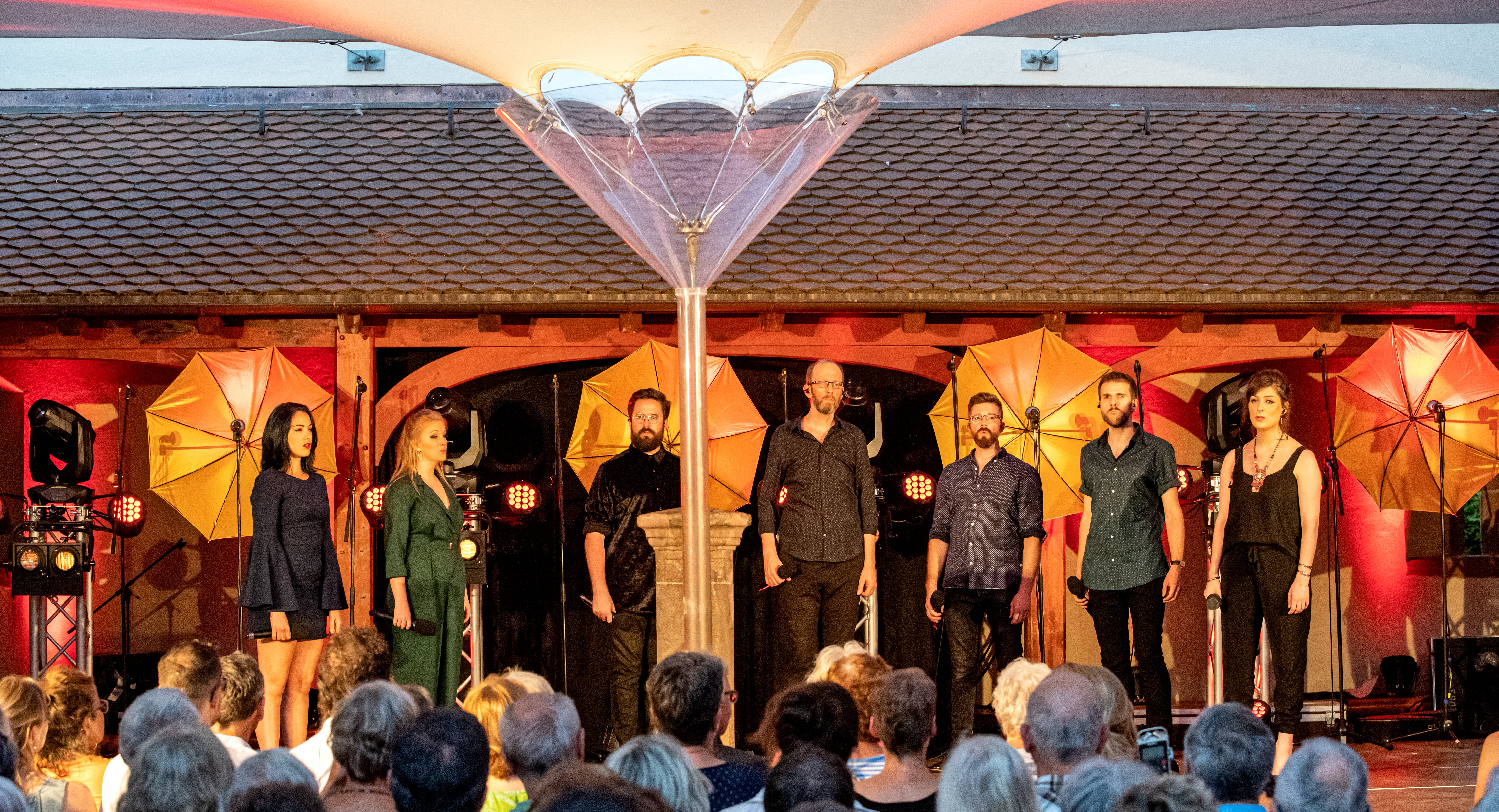 Bilder vom Black Forest Voices Festival in Kirchzarten. Ein Festival mit Workshops für Chöre und A Capella Gesang vom 27. 6. 2019 zum 30.06. 2019